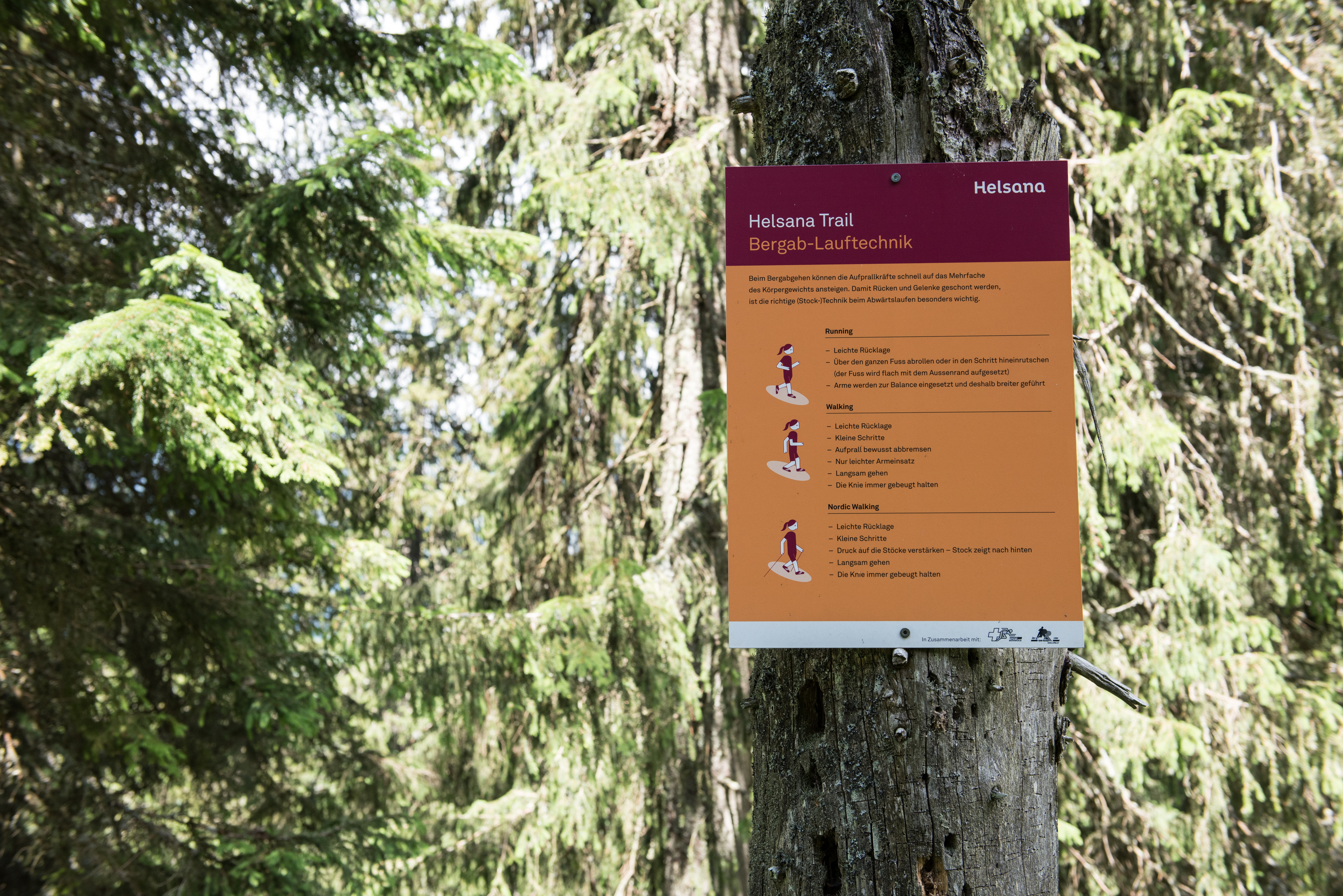 Helsana Trail Sankt Johann Trainingsschild mit Anleitung für Bergab-Lauftechnik